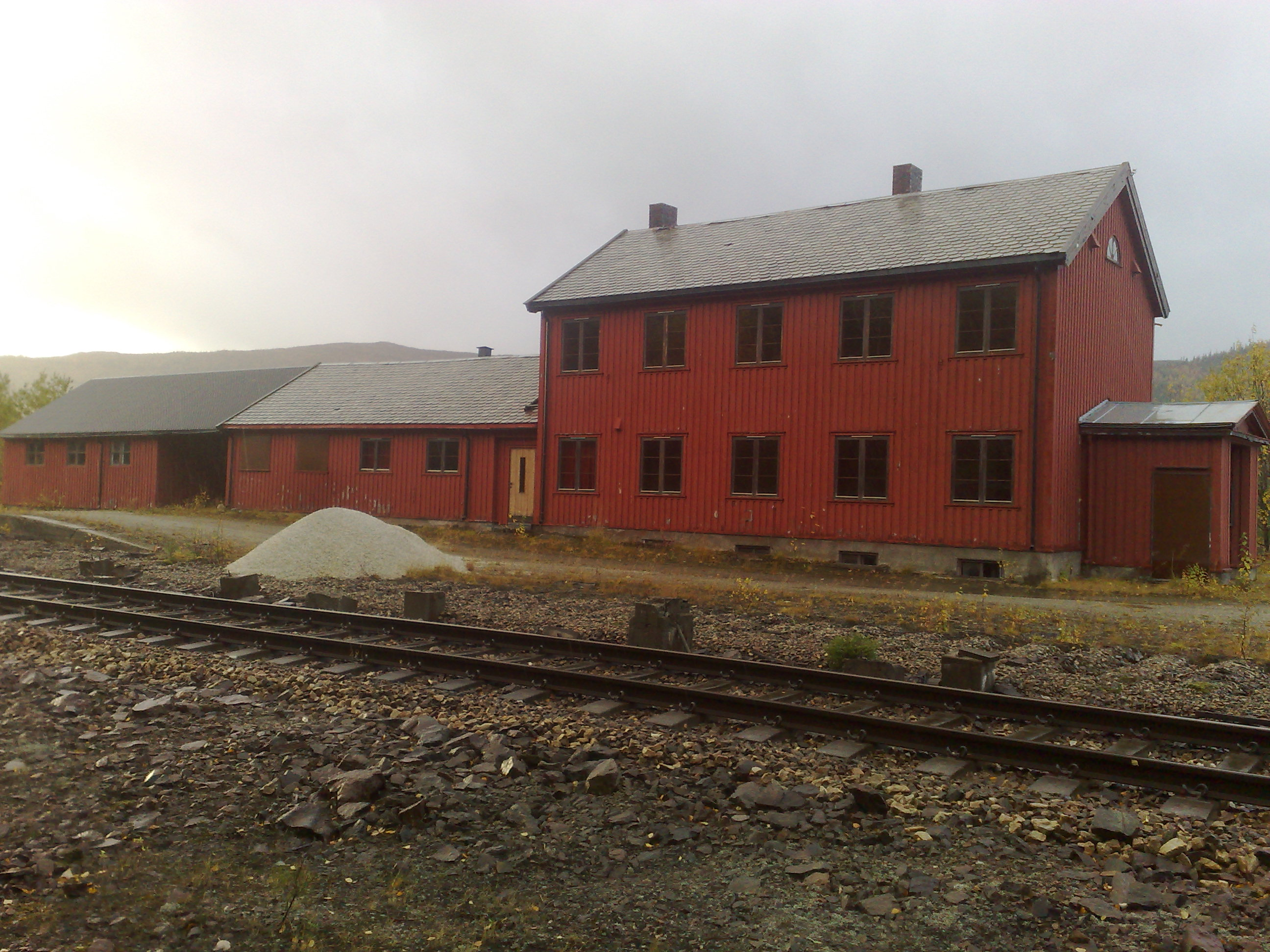 Brekkvasselv stasjon på Brekkvasselv/Namsskogan/Nord-Trøndelag